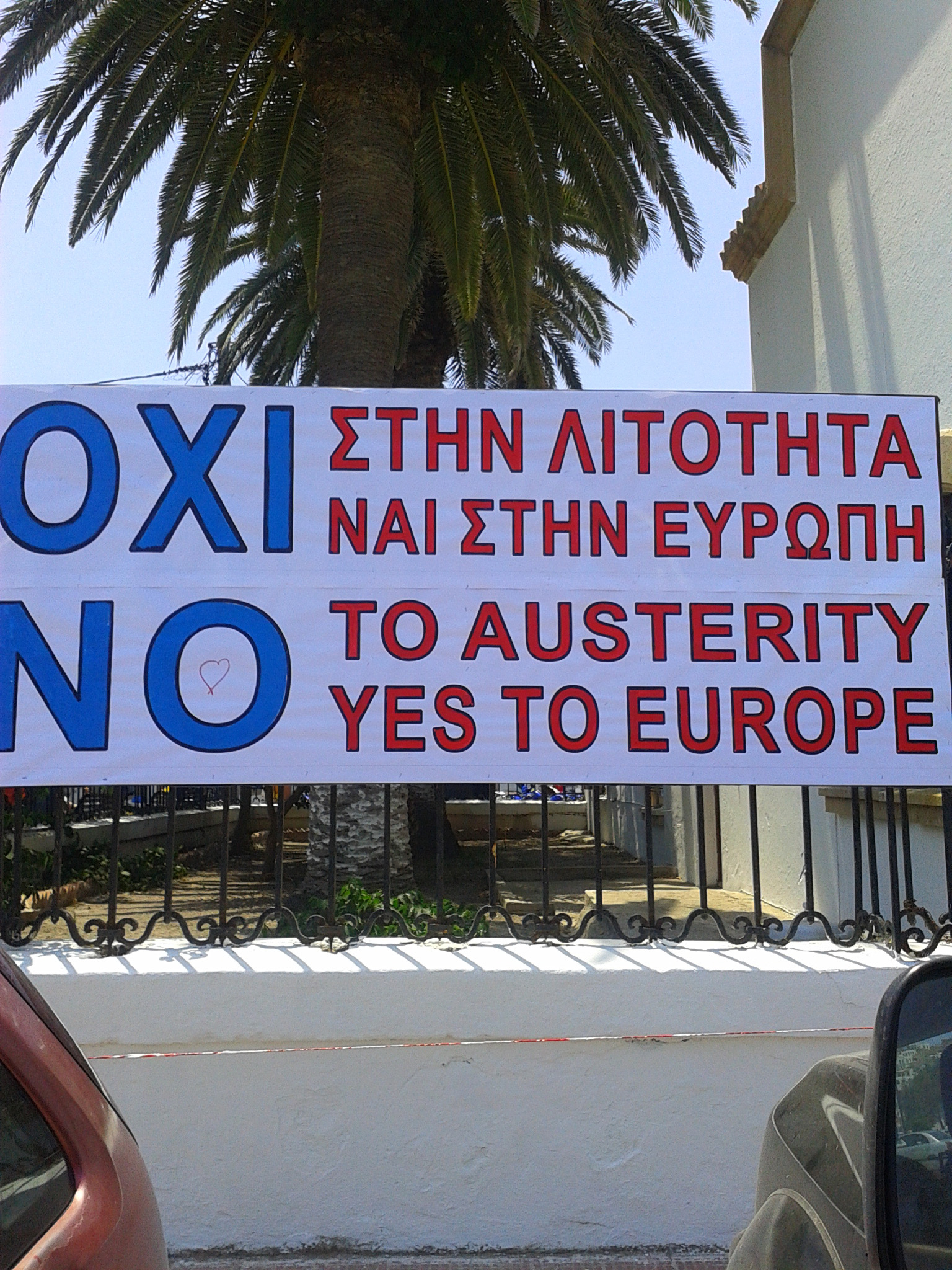 Patmos Grèce NON au référendum sur l'austérité